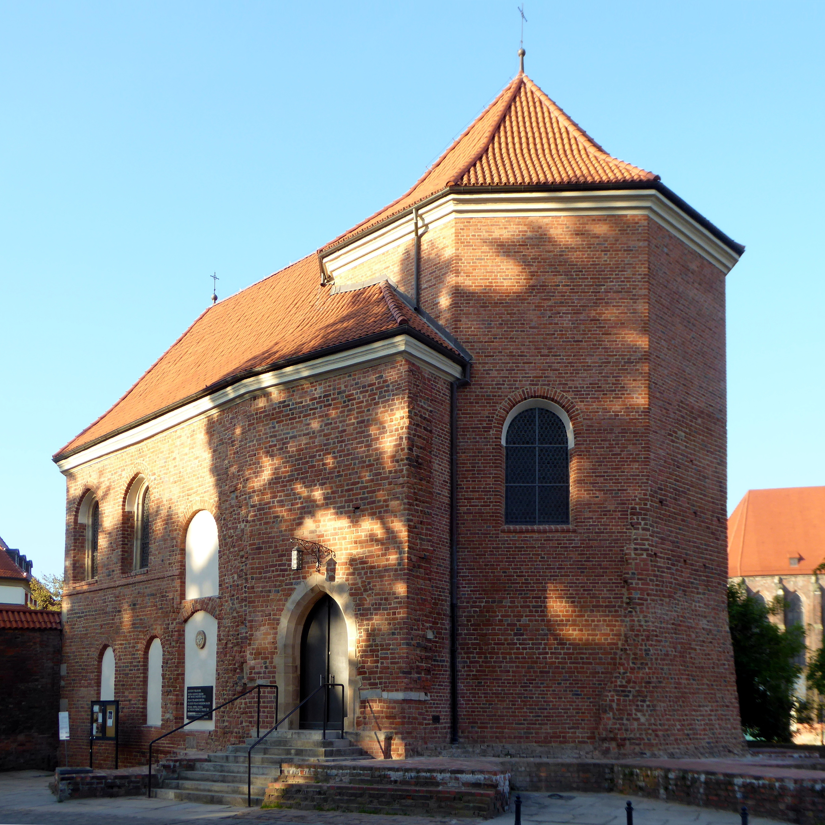 Breslau (PL), Martinskirche von Norden.